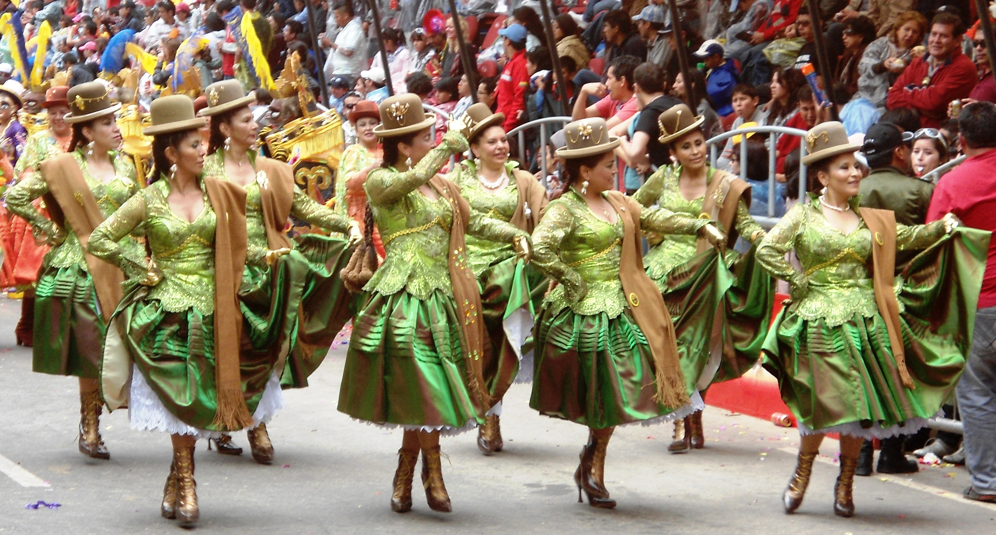 Desfile de morenada 02 Carnaval de Oruro 2012